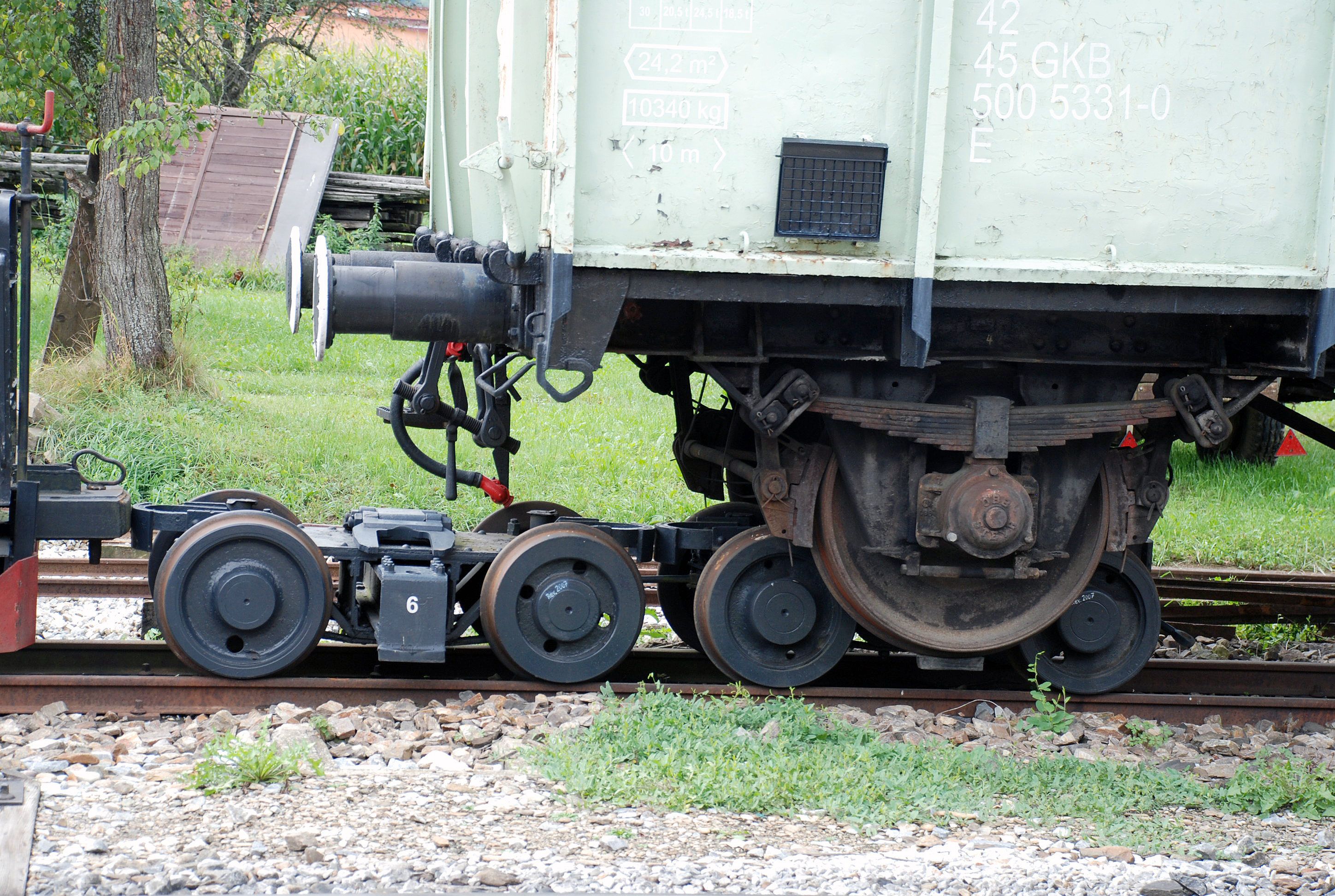 Bahnhof Stainz der Lokalbahn Preding-Wieselsdorf - Stainz (Stainzer Lokalbahn, Flascherlzug): Rollschemel / Rollböcke der Lokalbahn